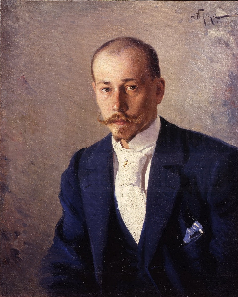 Портрет скульптора Константина Фёдоровича Крахт, написанный Александром Владимировичем Маковским